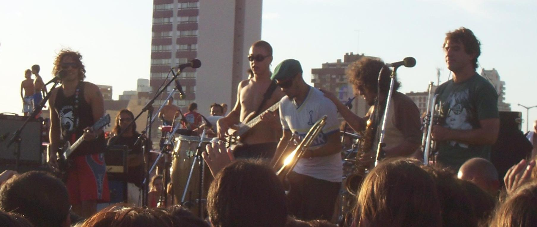 No te va gustar dando un show en la ciudad de Necochea, Buenos Aires, Argentina.